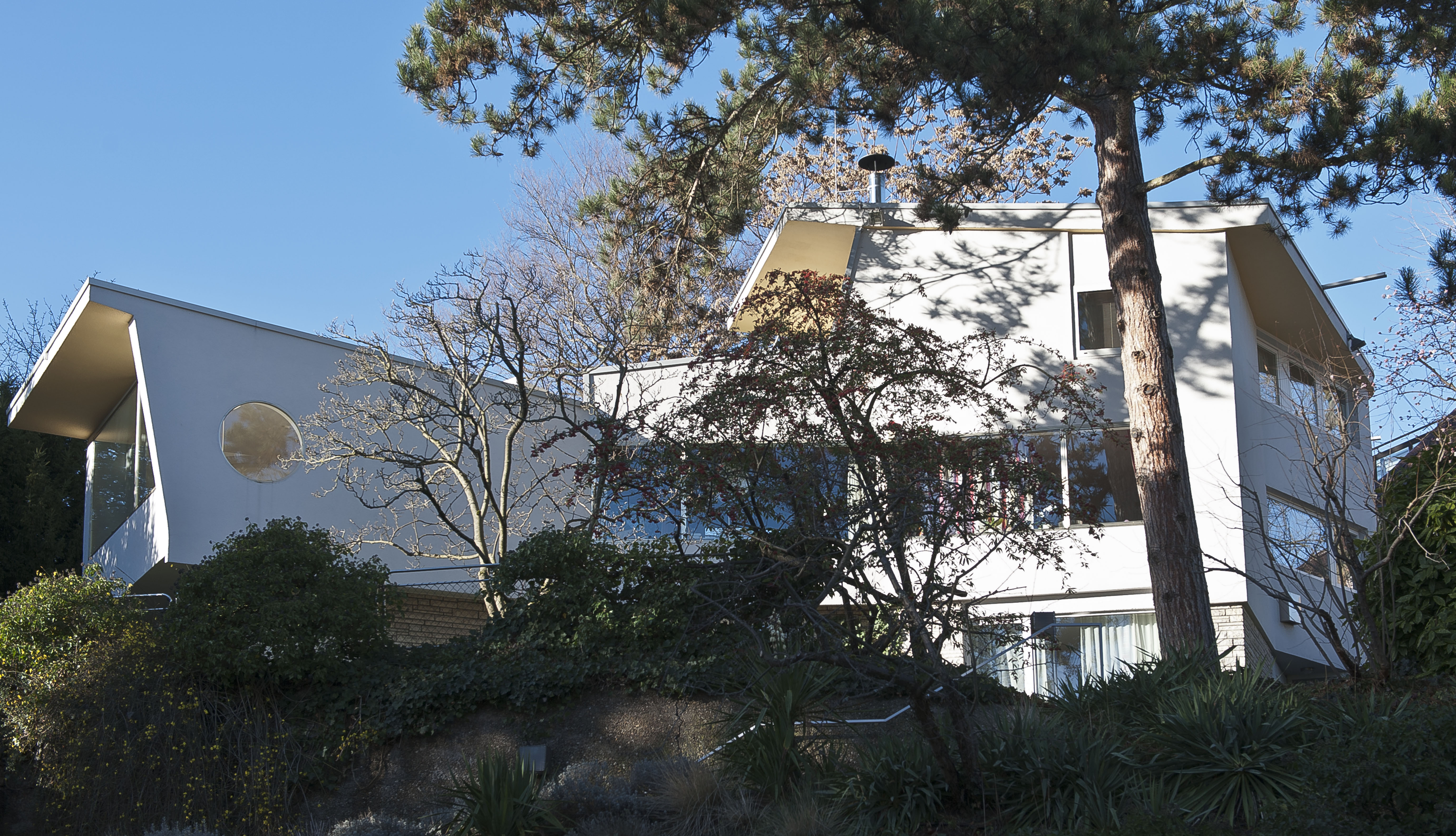 Haus Ketterer, Stuttgart (Architekt: Chen Kuen Lee)